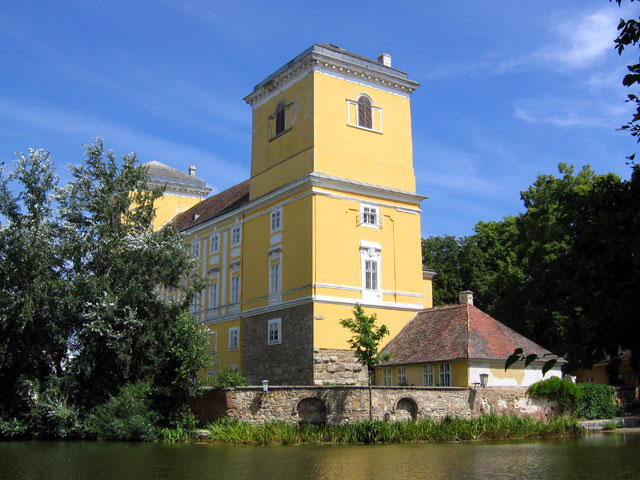 Schloss Wolkersdorf: Lizenz: GNU FDL Quelle: Foto plp Datum: de:2004 Ort: Wolkersdorf, Niederösterreich